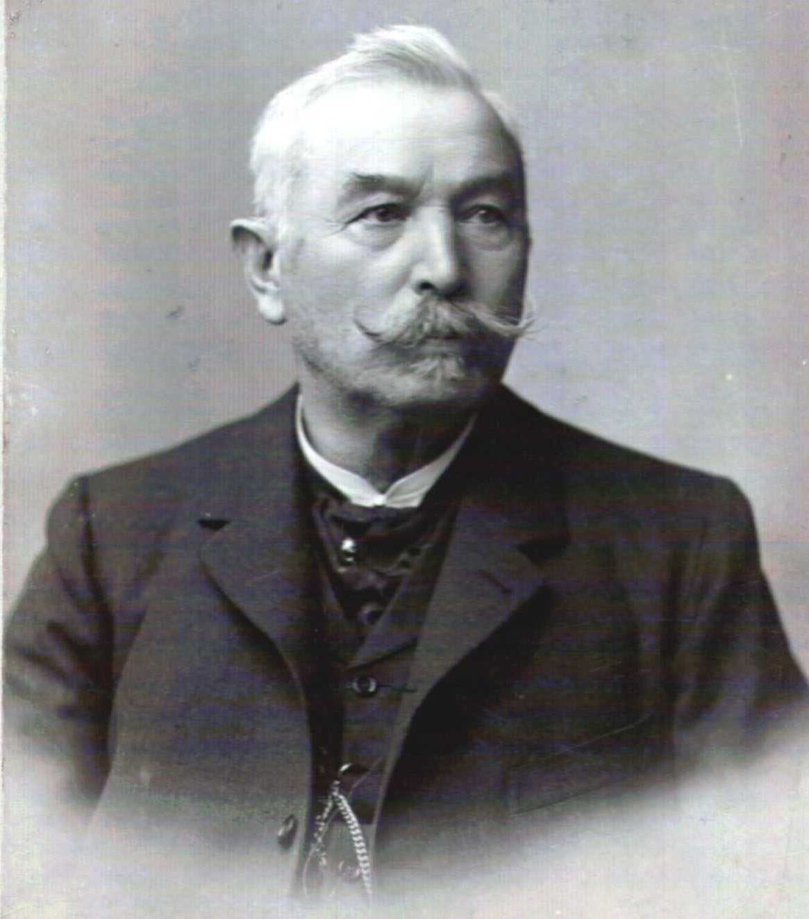 Wein János, nyugdíjas vízműigazgató